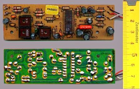 Leiterplatte, einlagig: Vor- und Rückseite